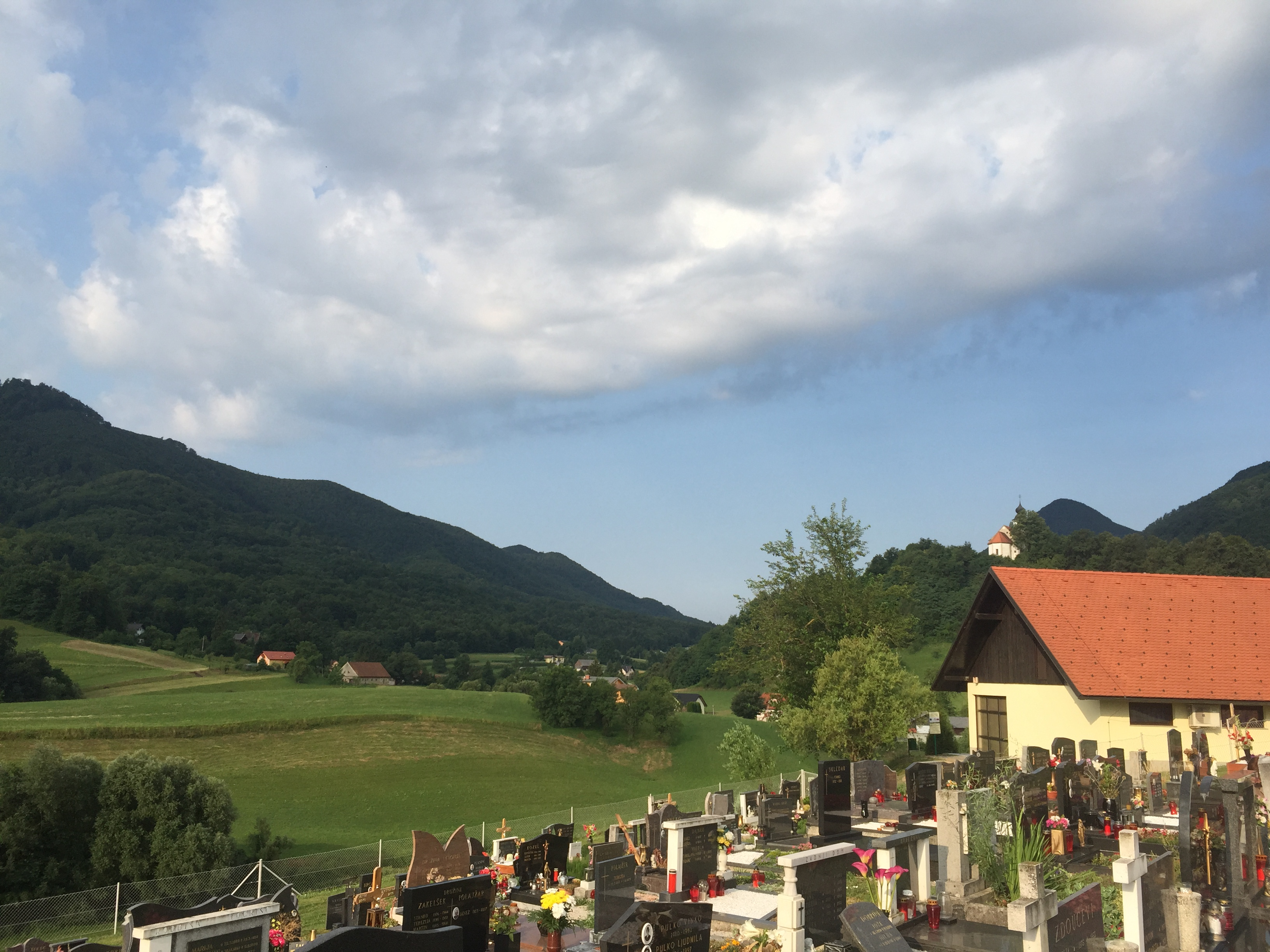 Žetale, Slovenia